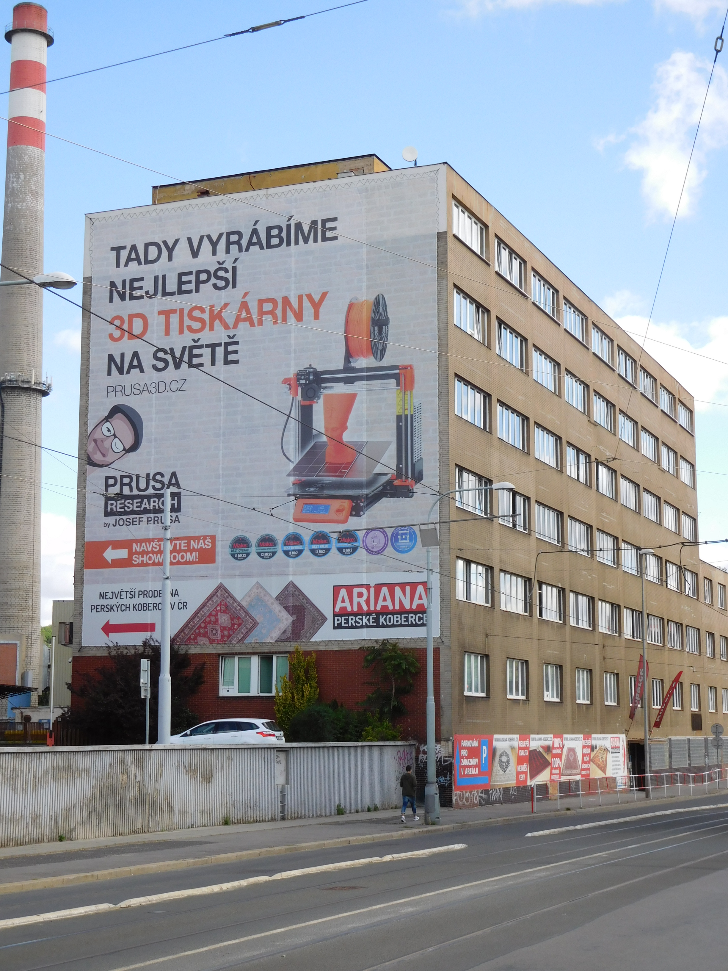 Praha - Holešovice, Partyzánská 7a - sídlo Prusa Research